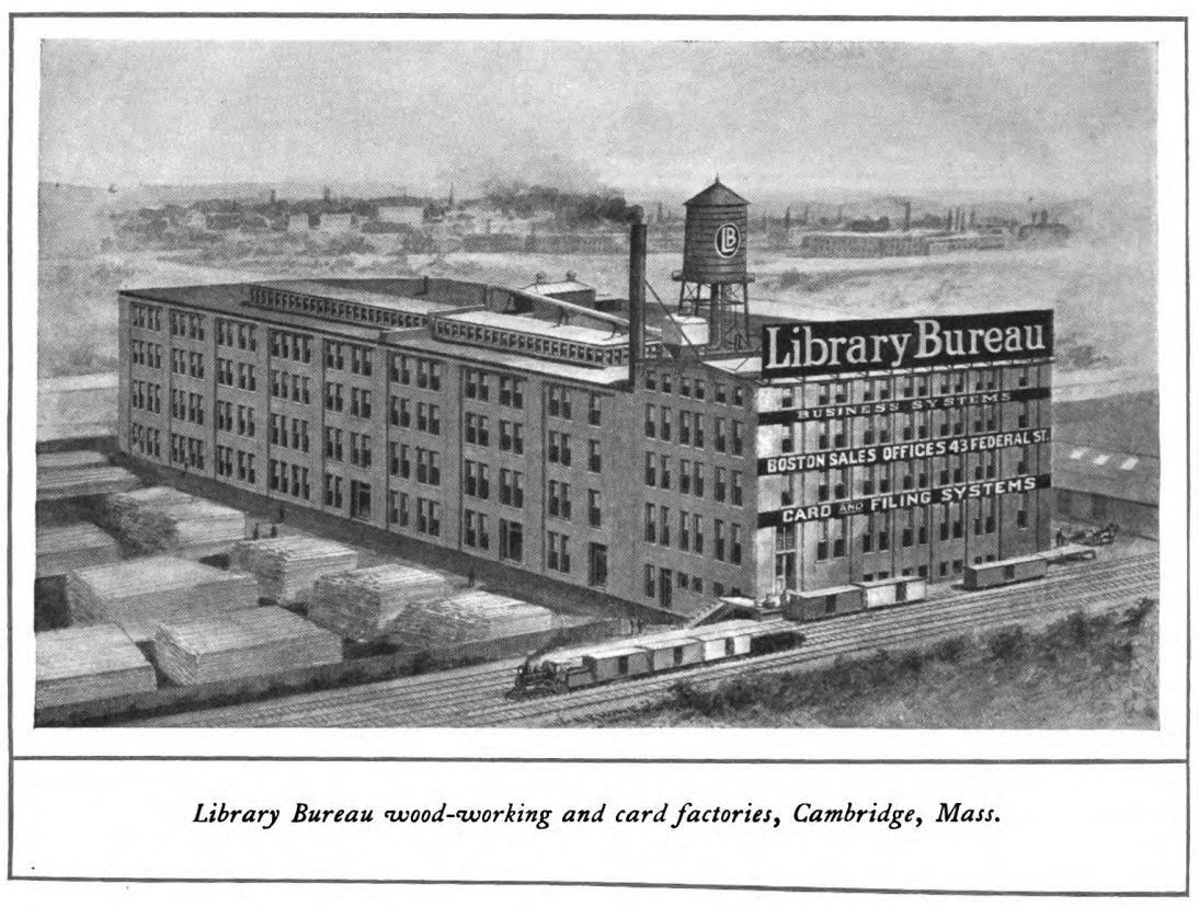 Les bâtiments de Library Bureau à Cambridge en 1909